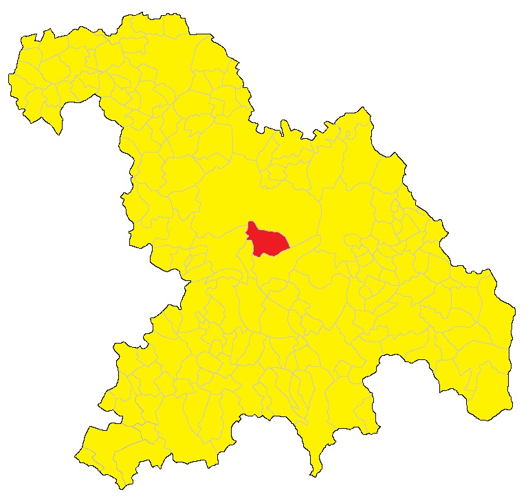 Mappa del comune di Frugarolo (AL)